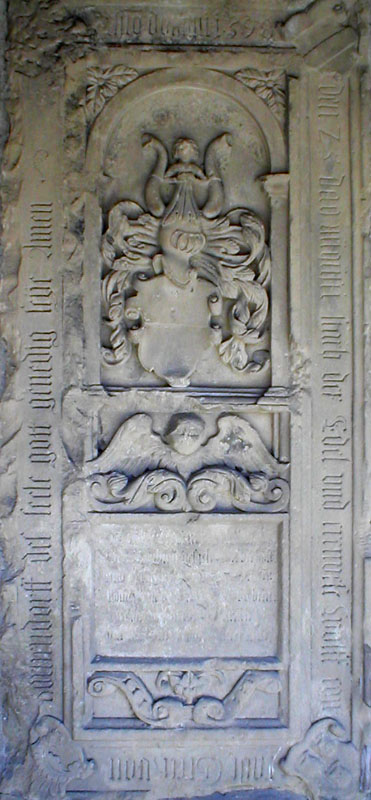 Grecken-Epitaph von 1598 an der Kirche Kochendorf (Bad Friedrichshall).